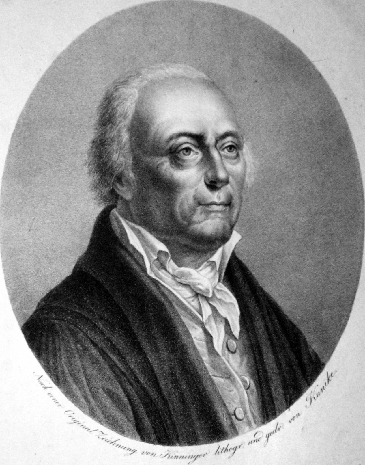 Nikolaus Joseph Jacquin (1727–1817), Lithographie von Adolf Kunike (1777–1838), nach einer Zeichnung von Vincenz Georg Kinninger (1767–1851), Österreichische Nationalbibliothek